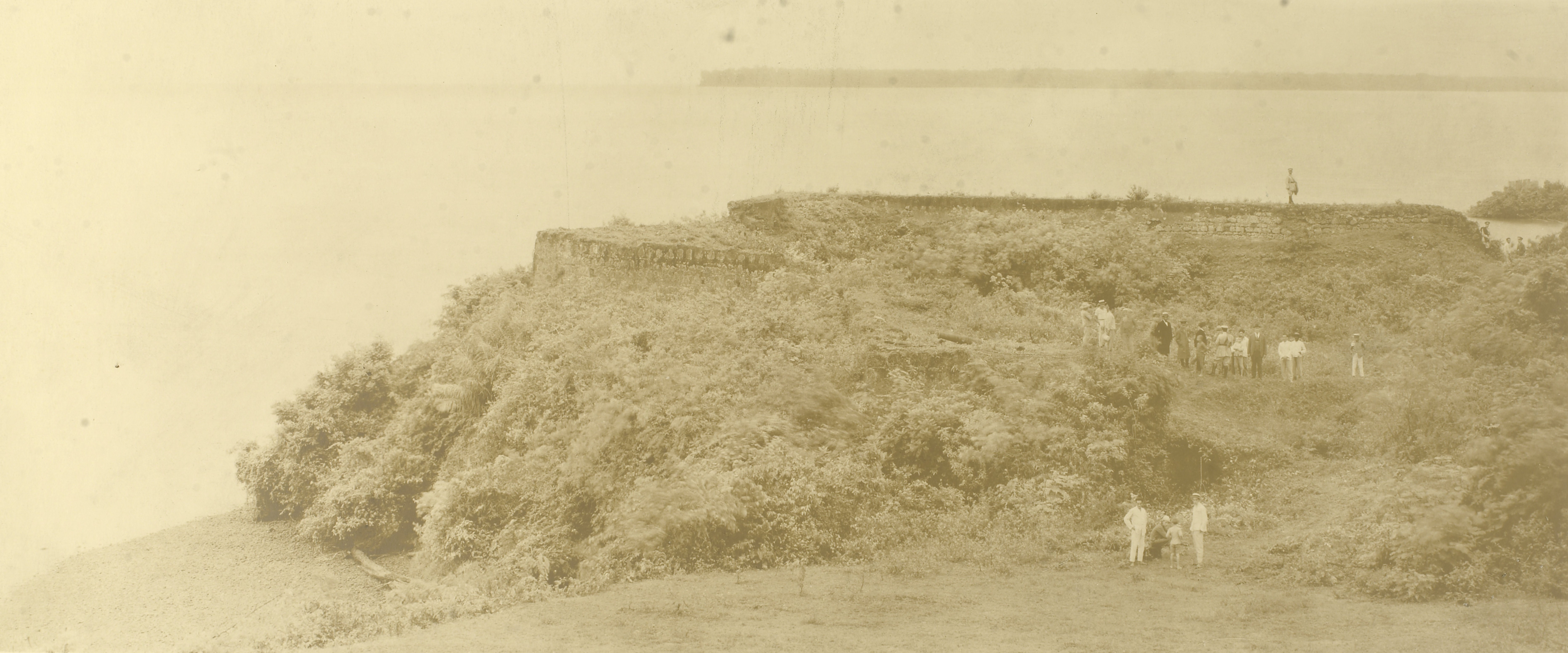 Imagem do Fundo Ministério da Guerra, do Arquivo Nacional